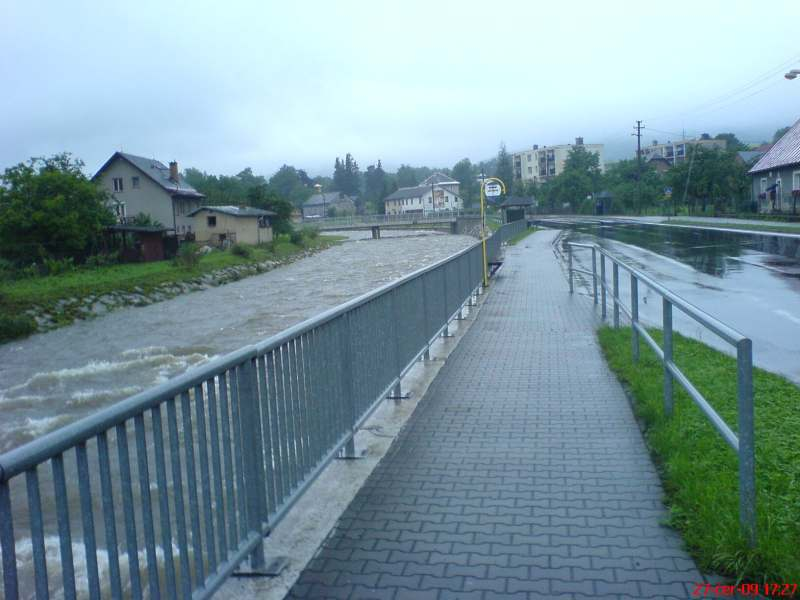 Písečná u Jeseníku říčka Bělá